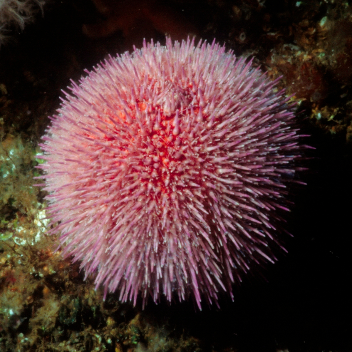 Echinus esculentus in Koster, Sweden